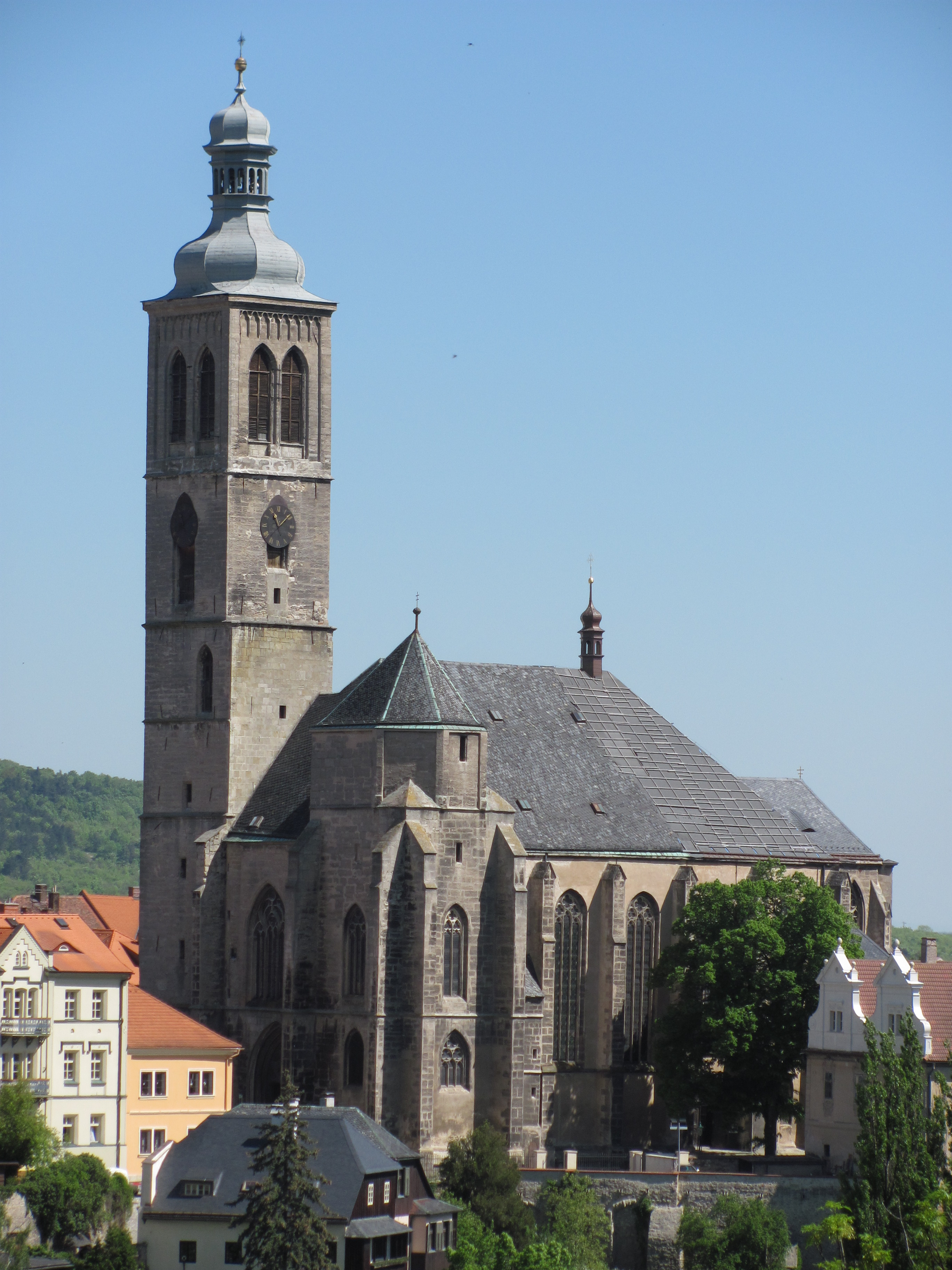 KH kostel sv. Jakuba jihozápadní pohled 2